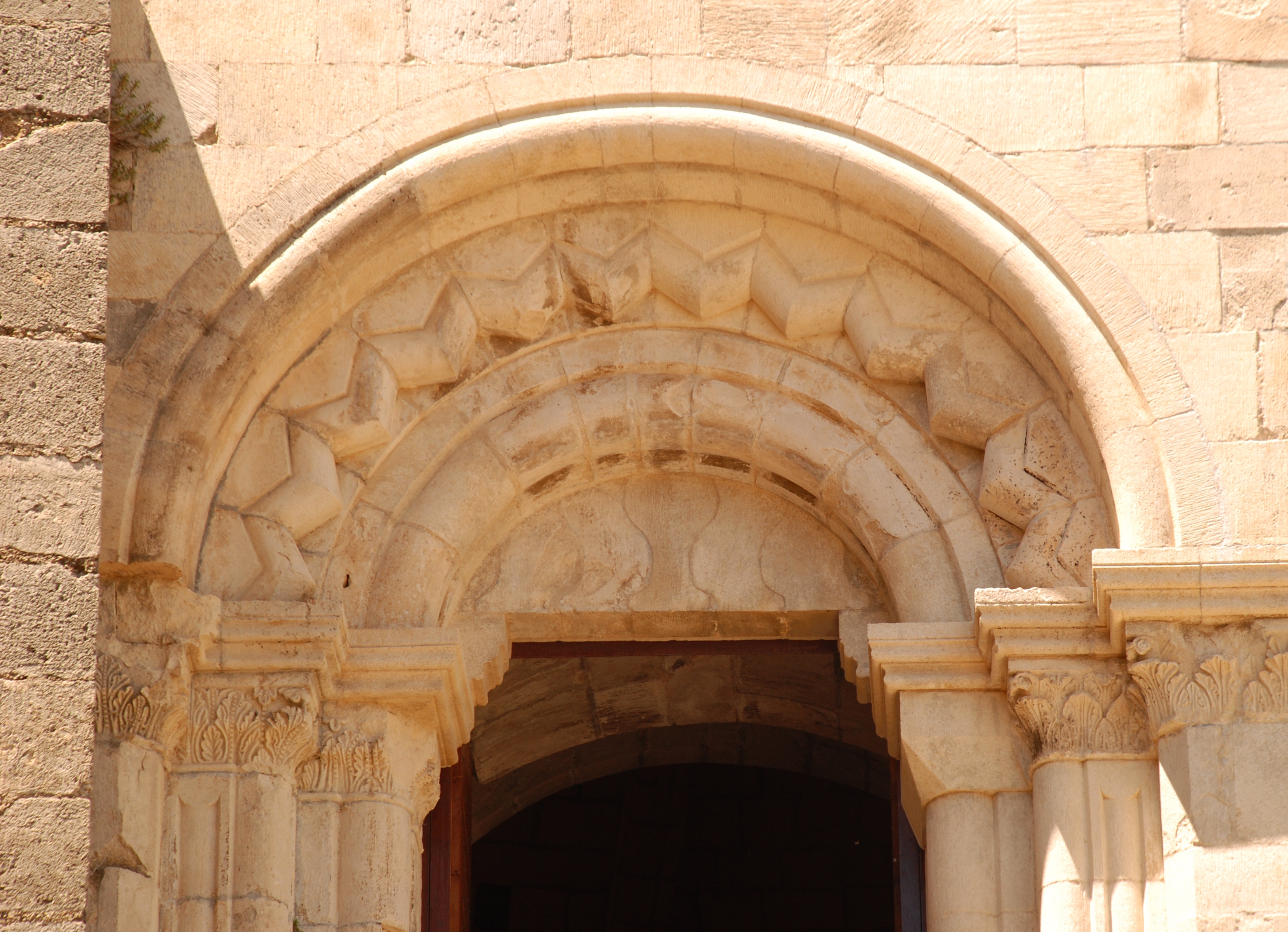 France - Provence - Château de Simiane-la-Rotonde